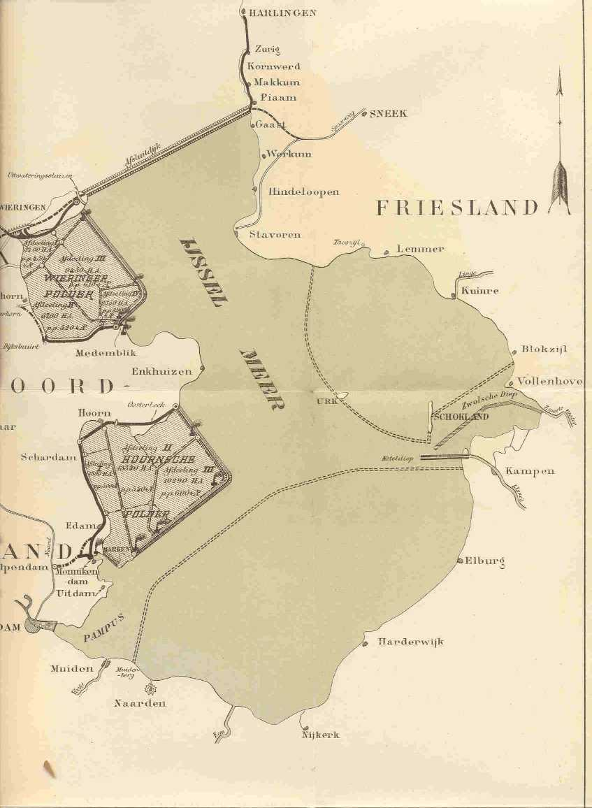 wegens ouderdom PD